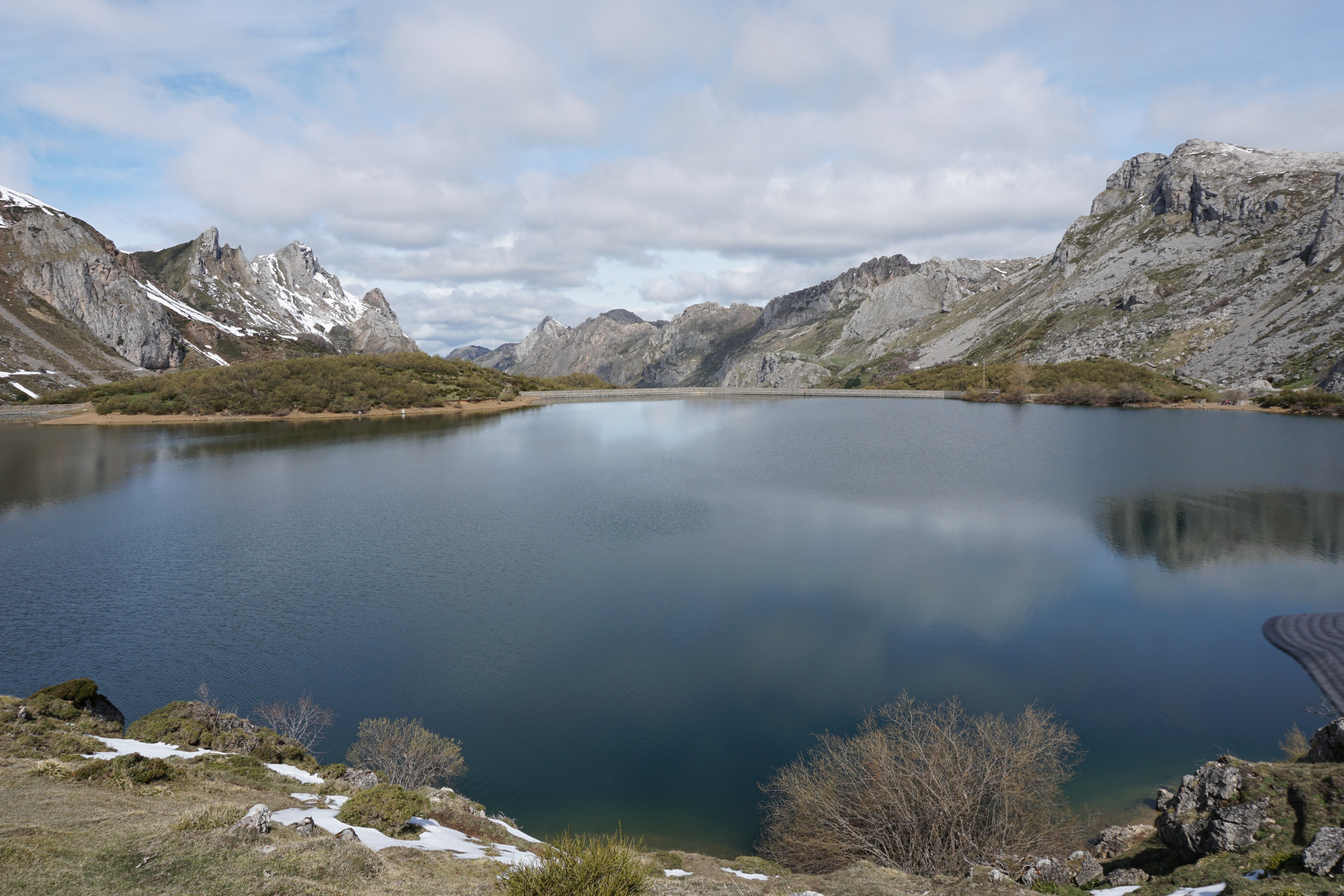 Somiedo This is a photography of a Special Area of Conservation in Spain with the ID: ES0000054. Natura2000 entry, EEA entry